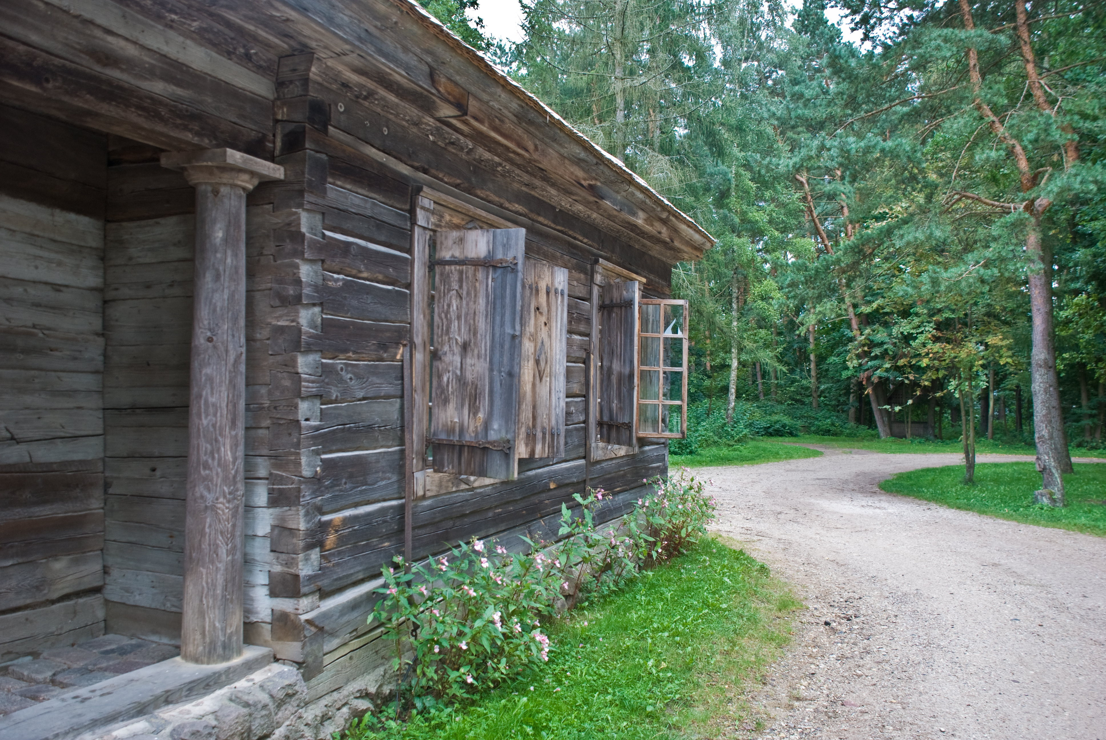 Old school house, Lietuvos Kaimo Muziejus, Rumsiskes, Lithuania, Sept. 2008